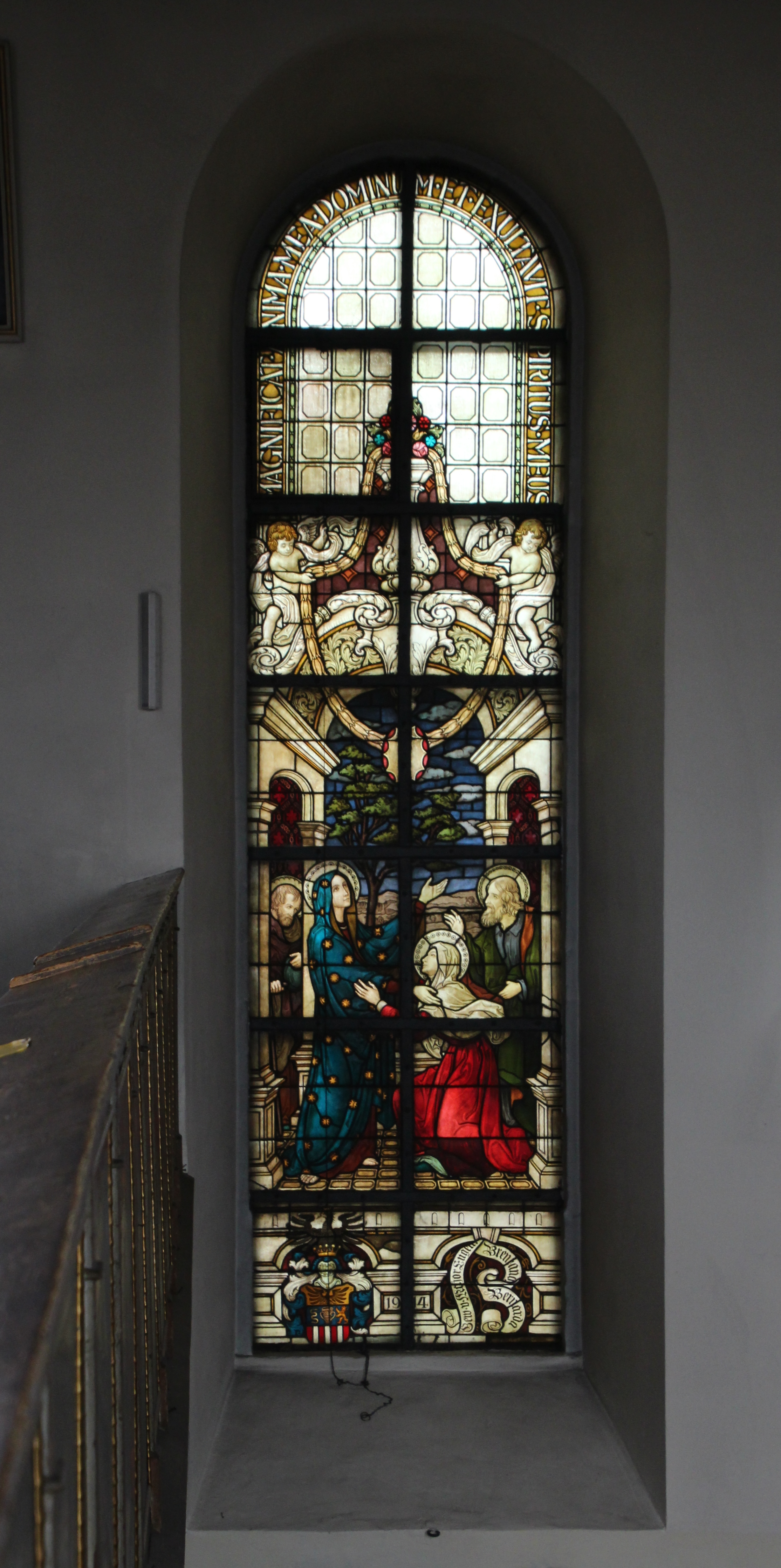 Kirch Heldenberg